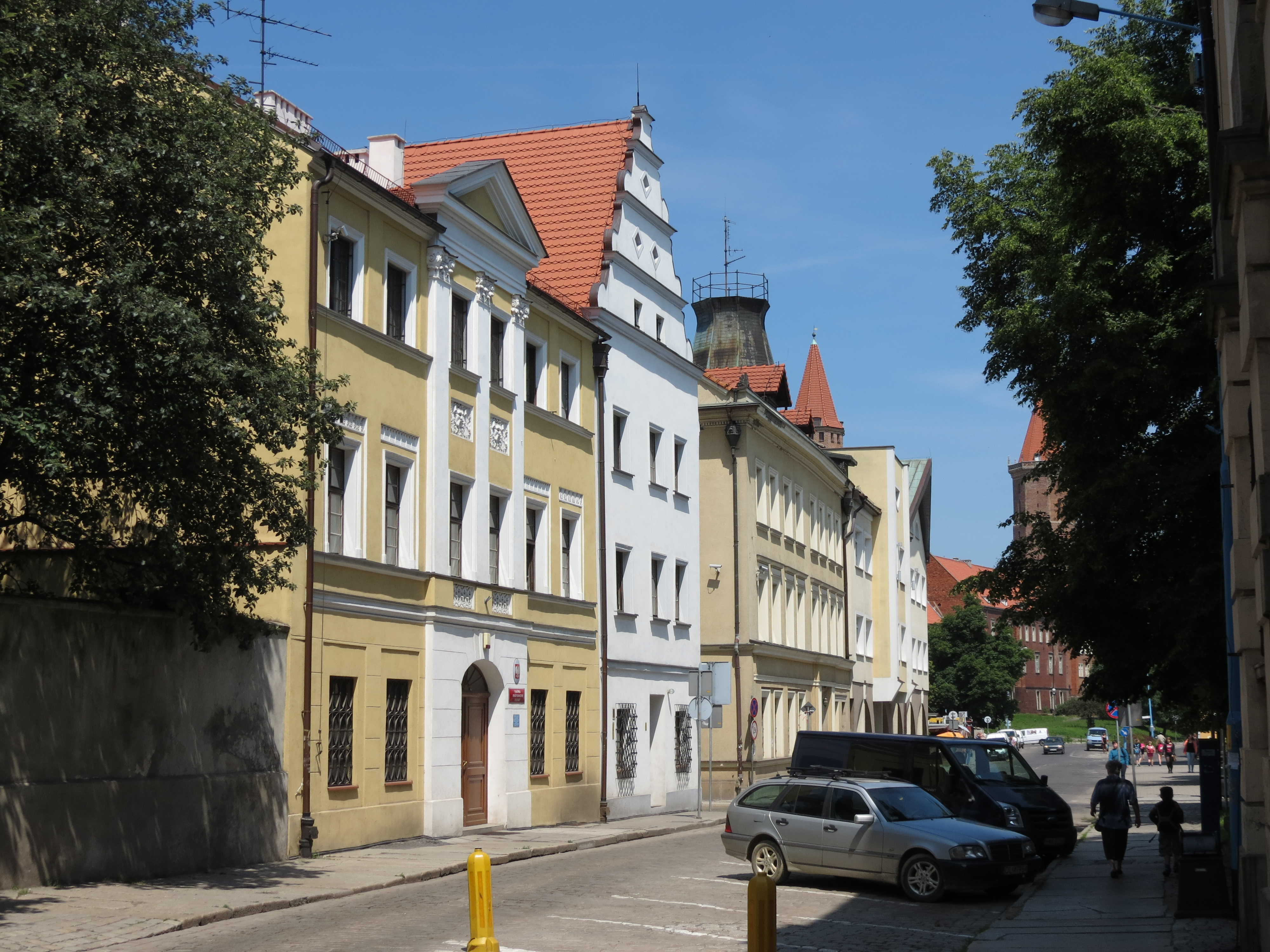 Legnica, kamienica, 1572, XIX/XX, 1976-1980